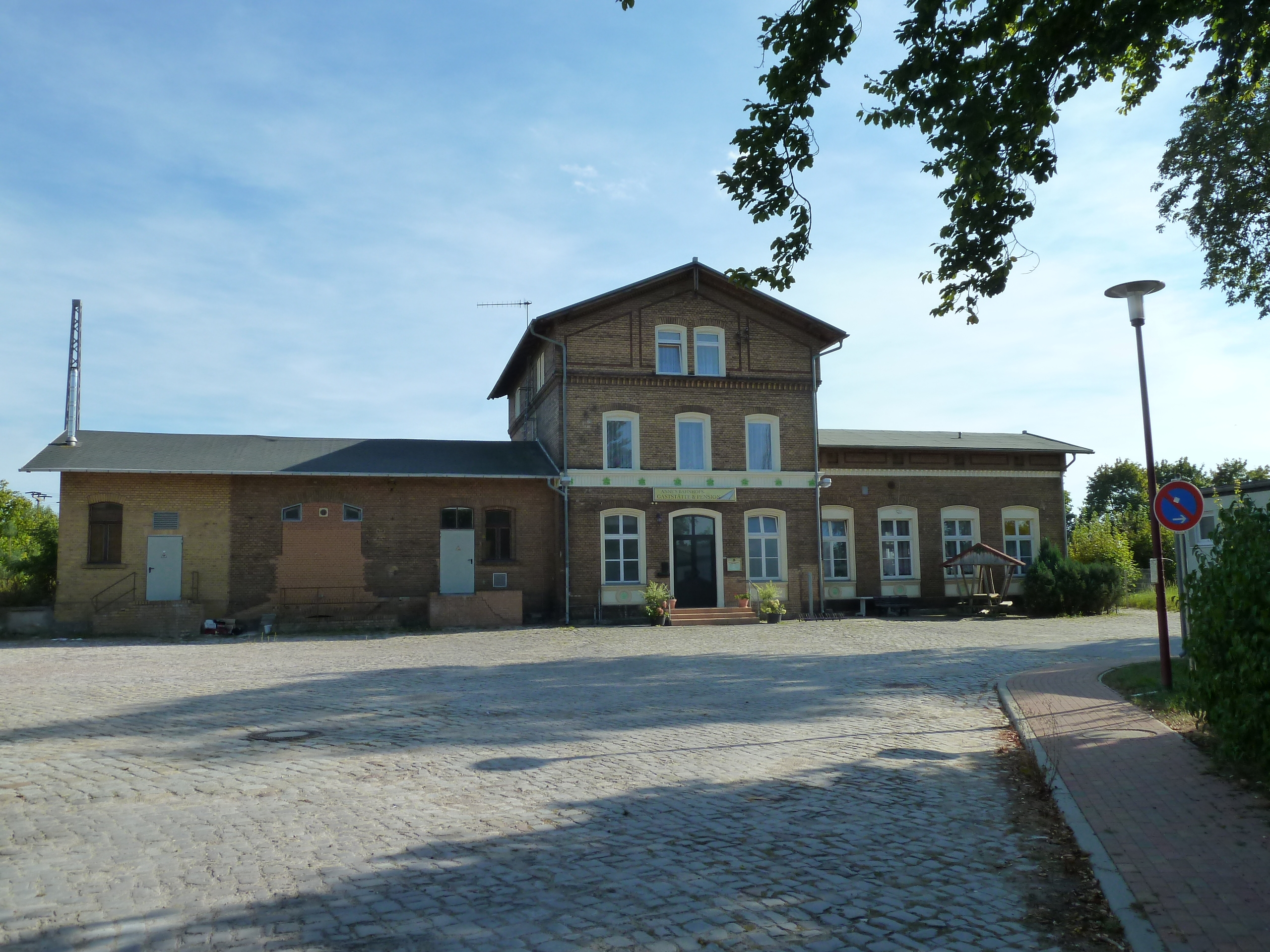 Bahnhof Lindau (Anh), Empfangsgebäude mit Vorplatz